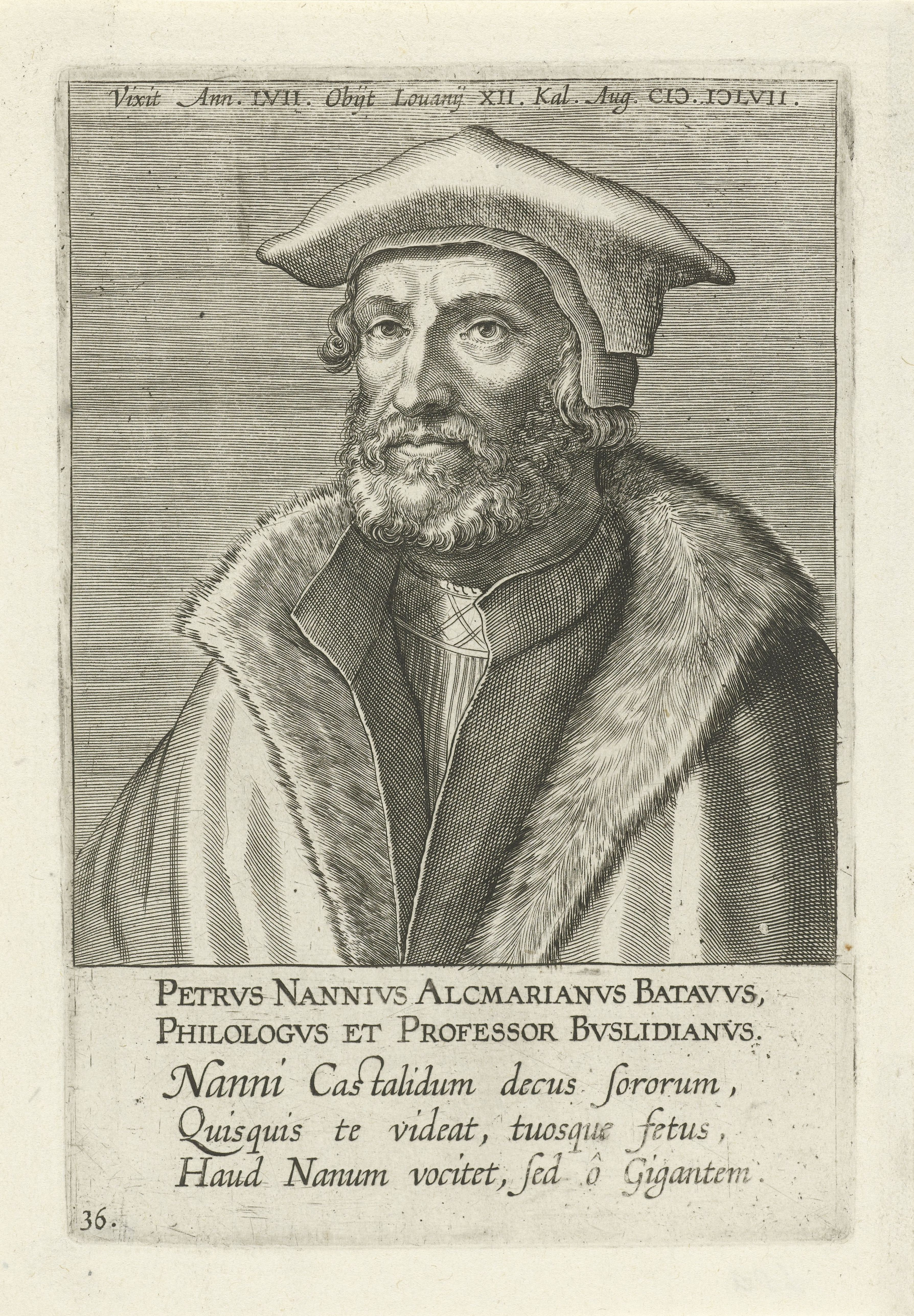 IdentificatieTitel(s): Portret van Petrus NanniusPetrvs Nannivs Alcmarianvs Batavvs (titel op object)Portretten van beroemde Nederlandse en Vlaamse geleerden (serietitel)Illustrium Galliae Belgicae scriptorum icones et elogi (serietitel)Objecttype: prent Serienummer: 36/51Objectnummer: RP-P-1906-1498Catalogusreferentie: New Hollstein Dutch fig. 35-1(2)Opschriften / Merken: verzamelaarsmerk, verso midden onder, gestempeld: Lugt 2228Omschrijving: Portret van Petrus Nannius, professor te Leuven. Buste naar links. De prent heeft een Latijns boven- en onderschrift en maakt deel uit van een serie van beroemde Nederlandse en Vlaamse geleerden.VervaardigingVervaardiger: prentmaker: Philips Galle (toegeschreven aan atelier van)schrijver: Andreas Schottuitgever: Philips Galleuitgever: Theodoor GallePlaats vervaardiging: AntwerpenDatering: 1604 - 1608Fysieke kenmerken: gravureMateriaal: papier Techniek: graveren (drukprocedé)Afmetingen: plaatrand: h 159 mm × b 108 mmOnderwerpWie: Petrus NanniusVerwerving en rechtenVerwerving: aankoop 1906Copyright: Publiek domein